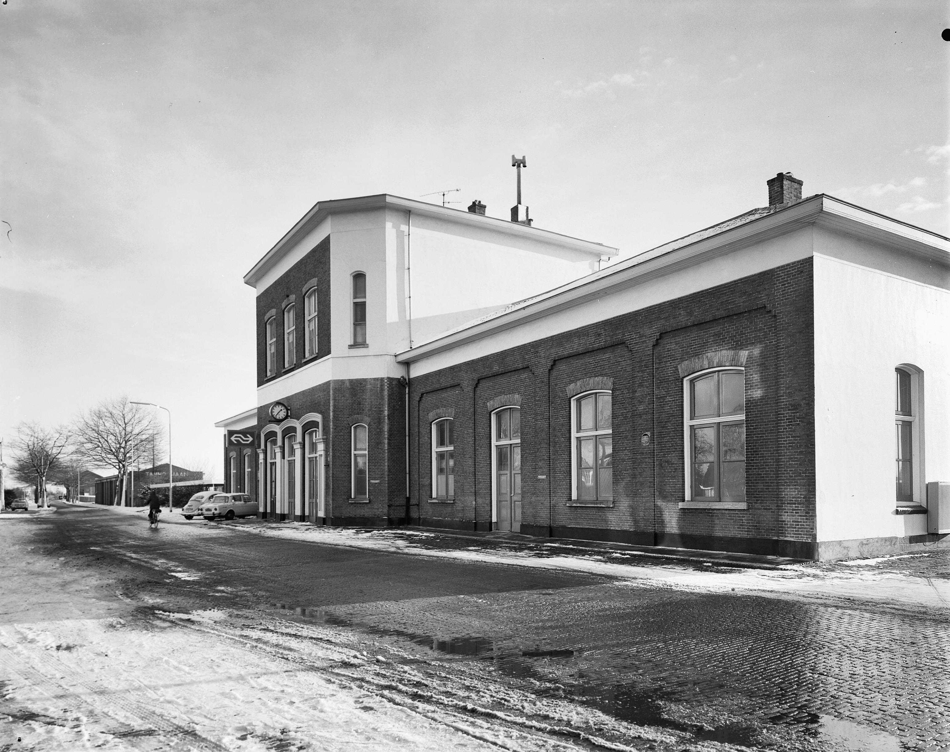 Station N.S.: voorgevel